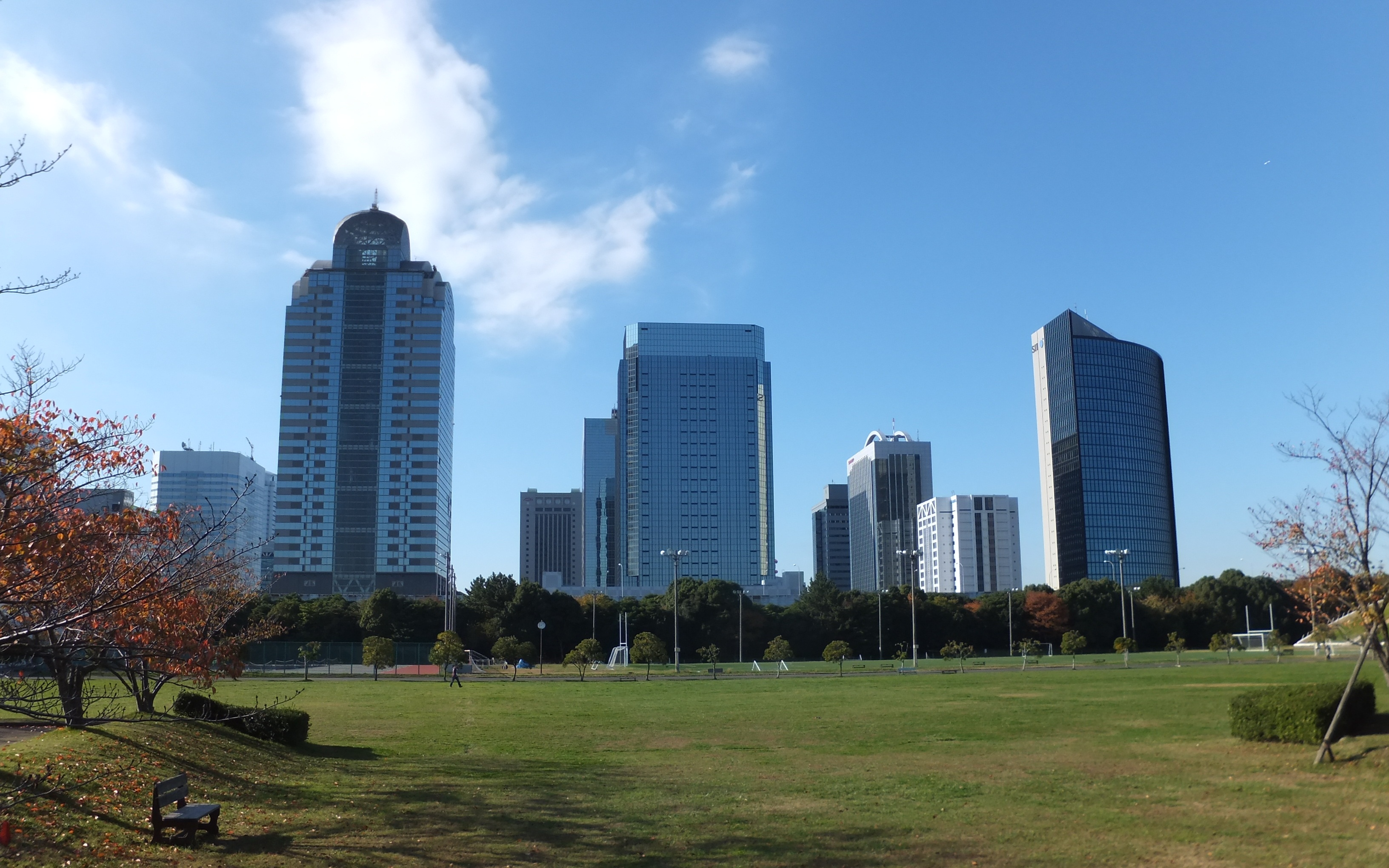 神田外語大学から見た幕張新都心